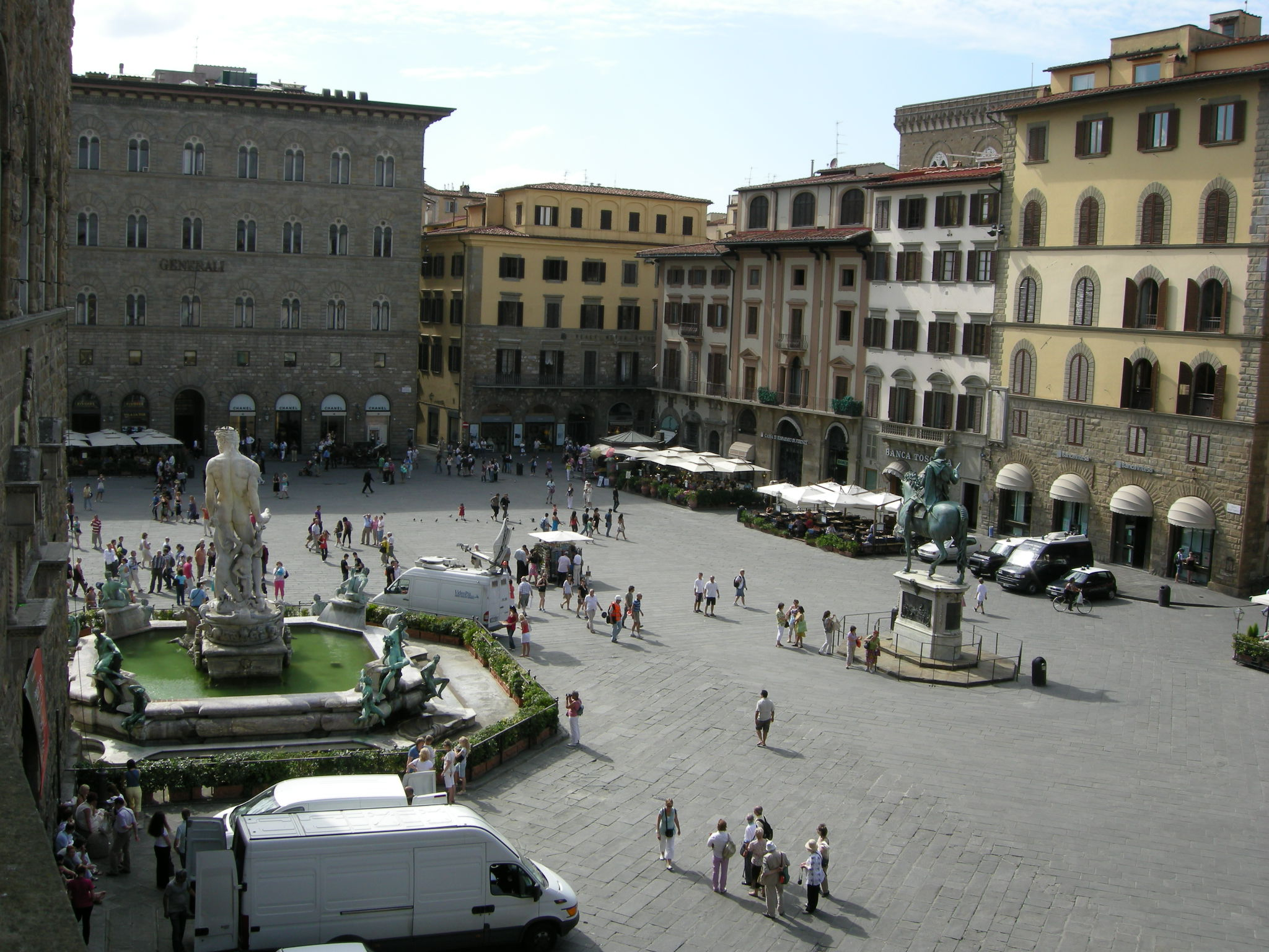 Piazza della signoria ari1